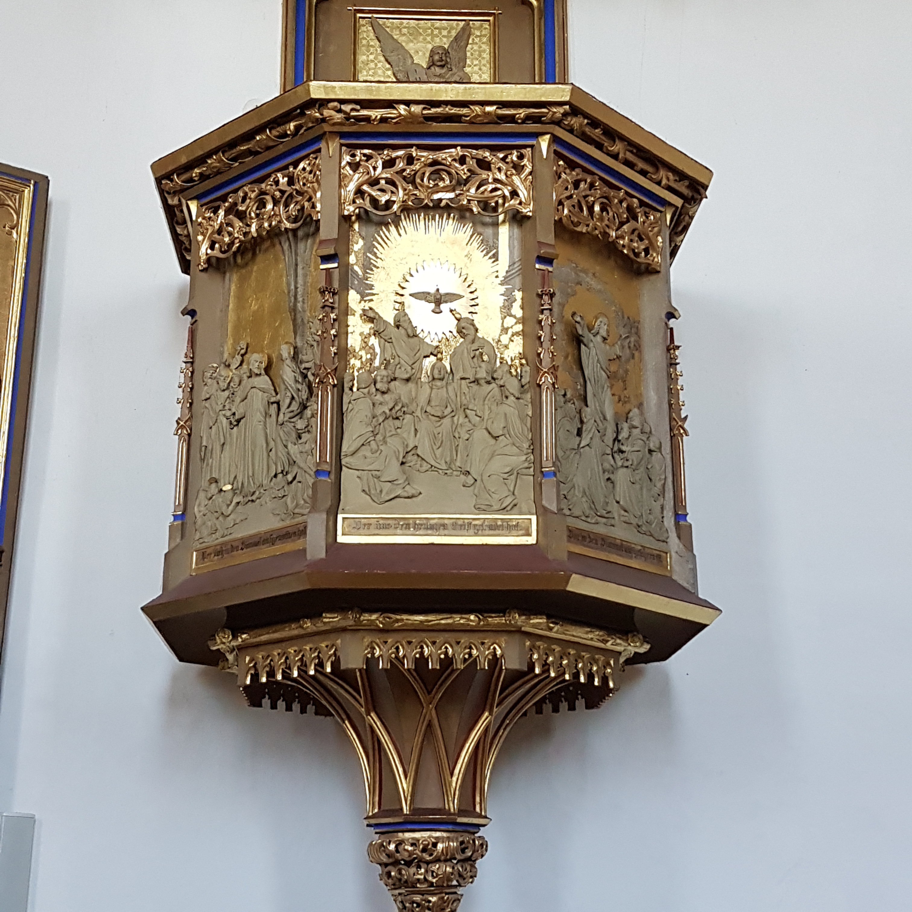 St. Johann der Täufer (Petting)